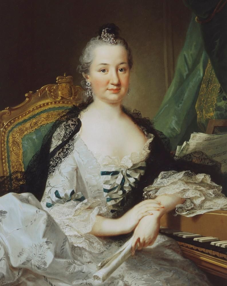 Kurfürstin Elisabeth Auguste am Spinett